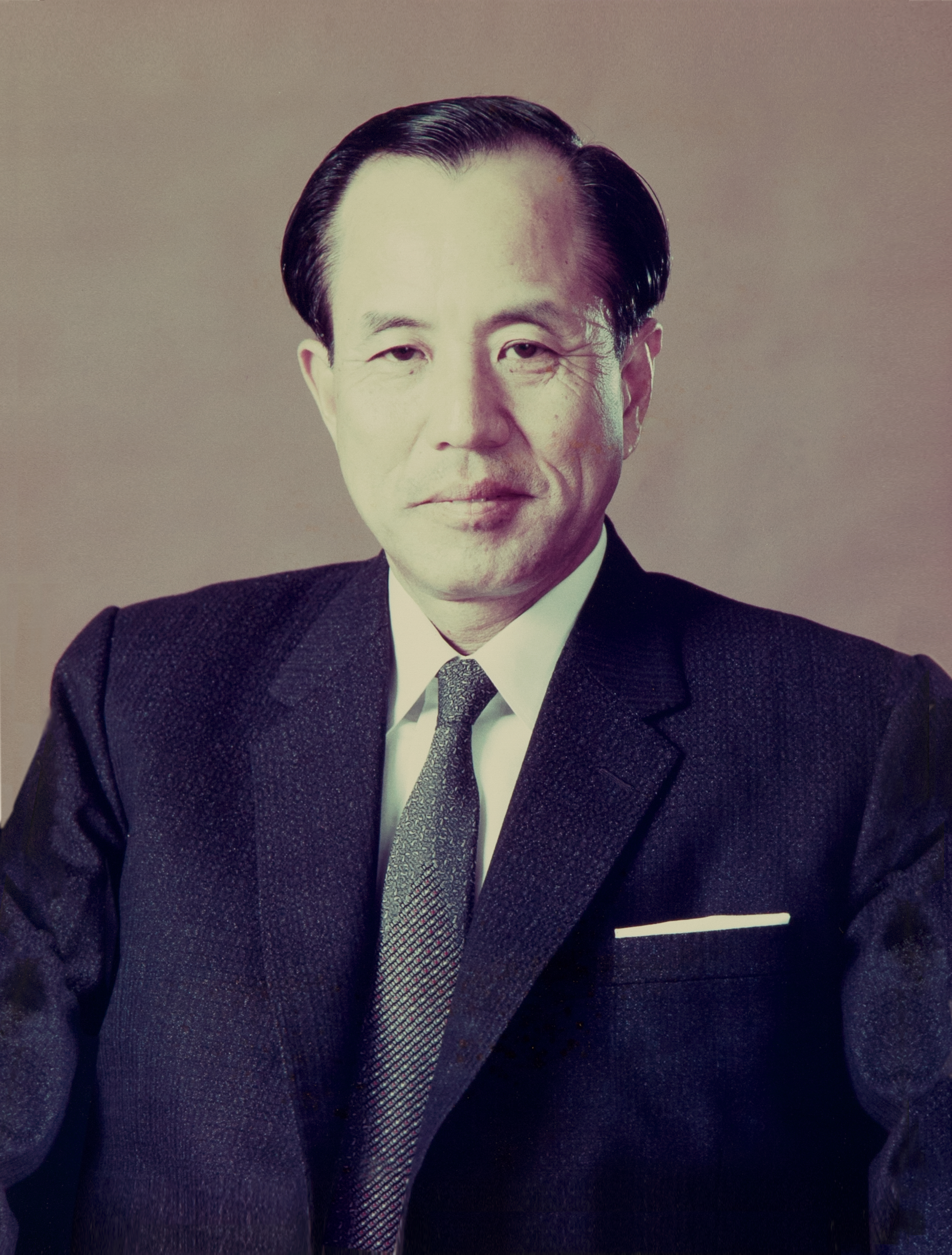 gondakeiji